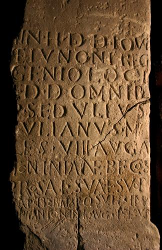 Beneficiarieraltar aus Bad Cannstatt Nutzungsbedingungen ausdrücklich auch für Wikipedia (siehe: [1])